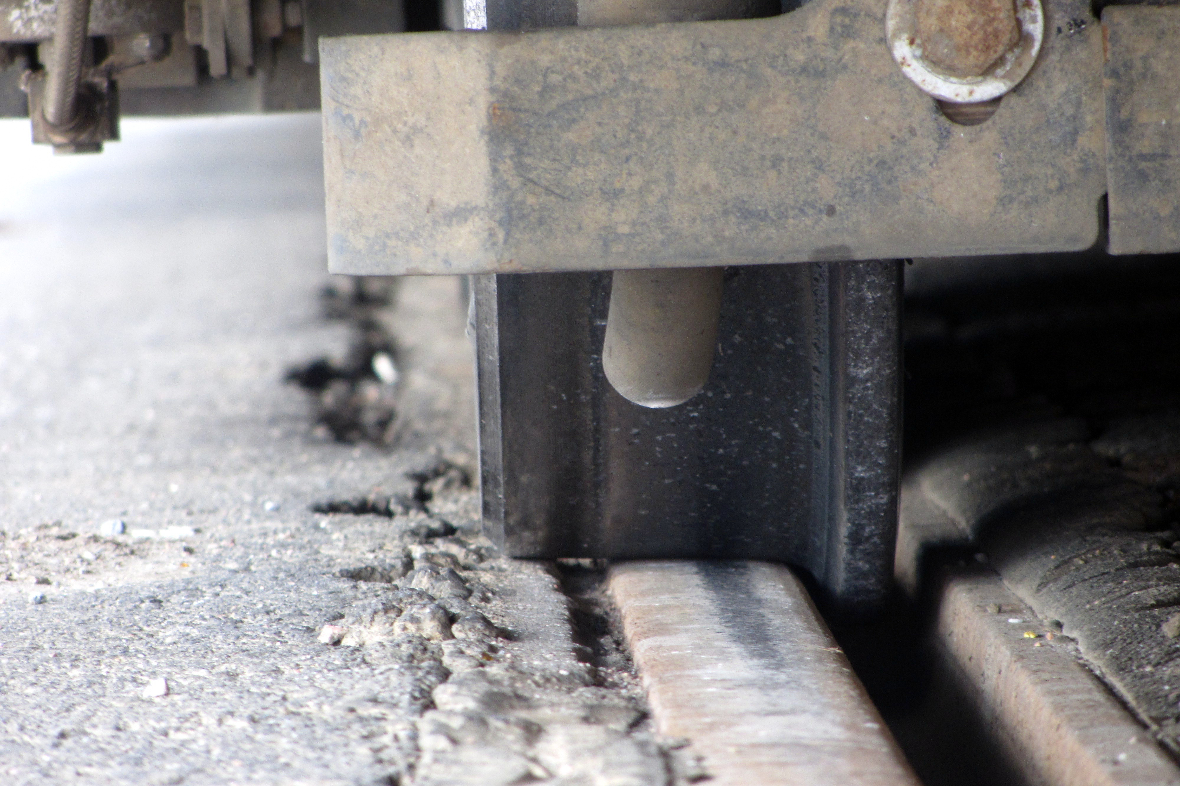 Ein typischer Kompromissradreifen mit Lauffläche in Fernbahnbreite. Sie wird für das sichere Überlaufen von Tiefrillenherzstücklücken benötigt, doch sollte der harte Fahrbahnbelag nicht direkt bis an den Schienenkopf verlegt werden.